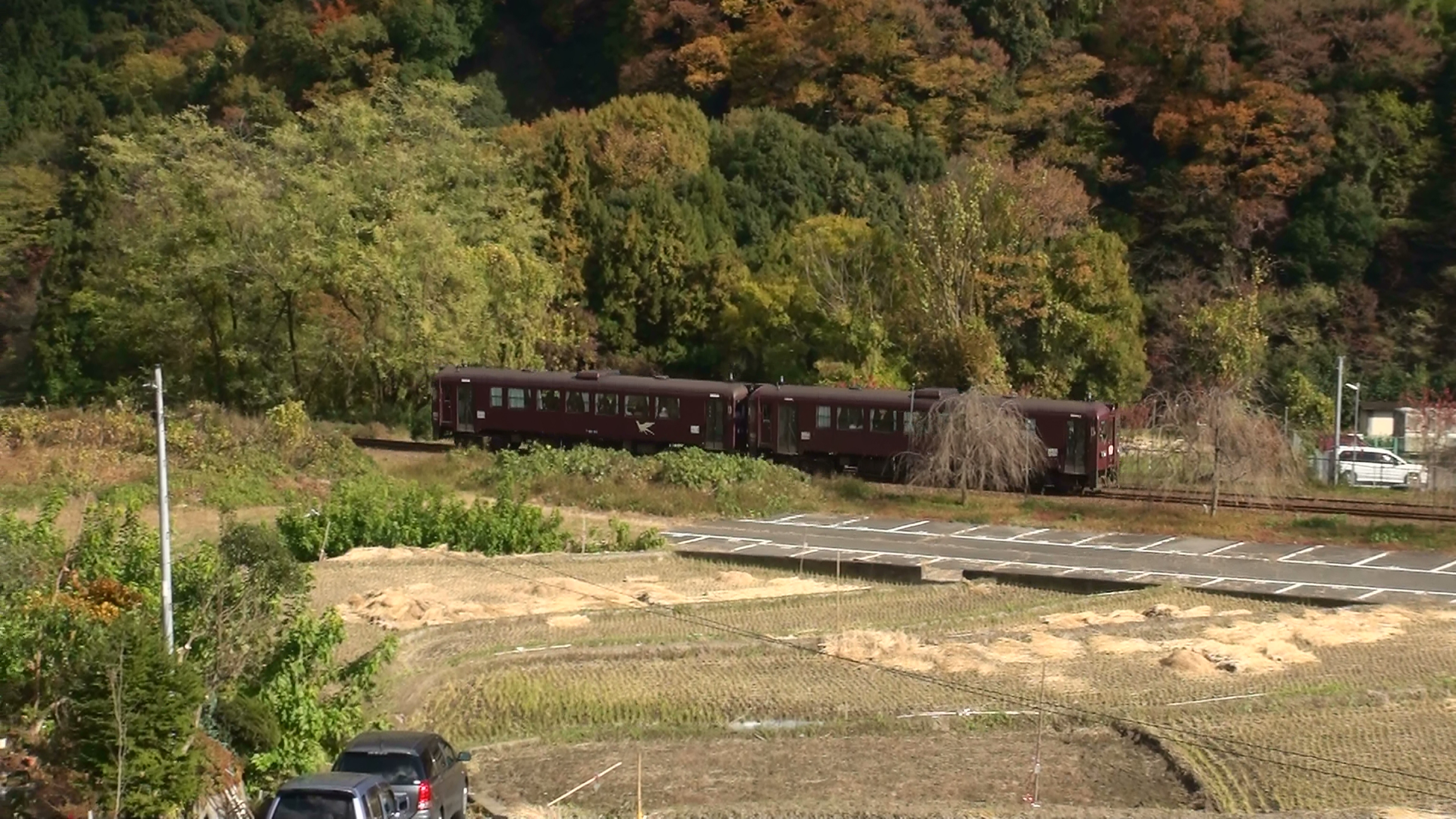 わたらせ渓谷鉄道